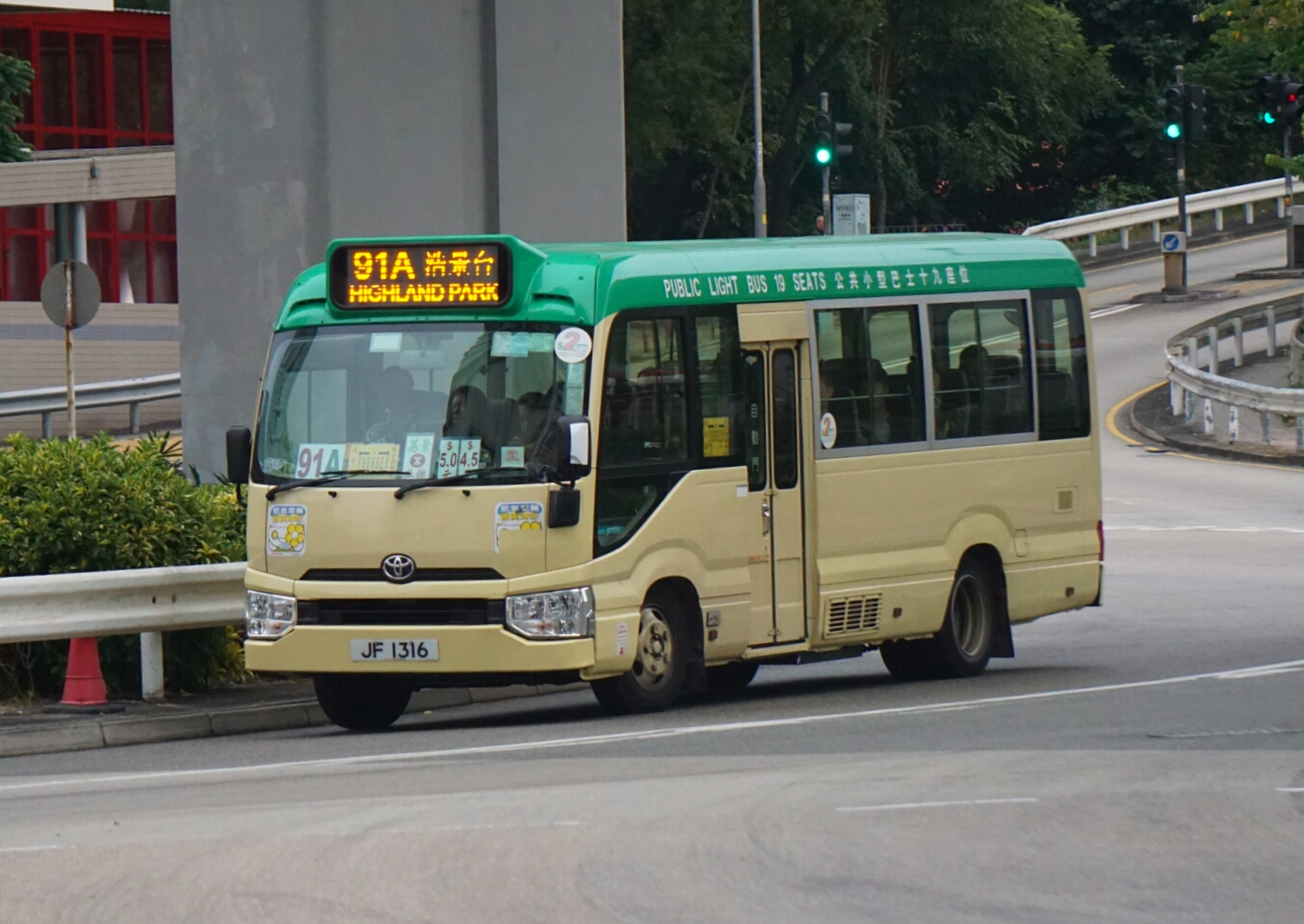 中文（香港）: 新界區專線小巴91A線，正途經葵福路近貨櫃碼頭路交匯處